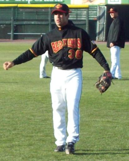 Alejandro Machado 4/14/09 18:44, 15 April 2009 . . Phil5329 . . 411×515 (32 KB)